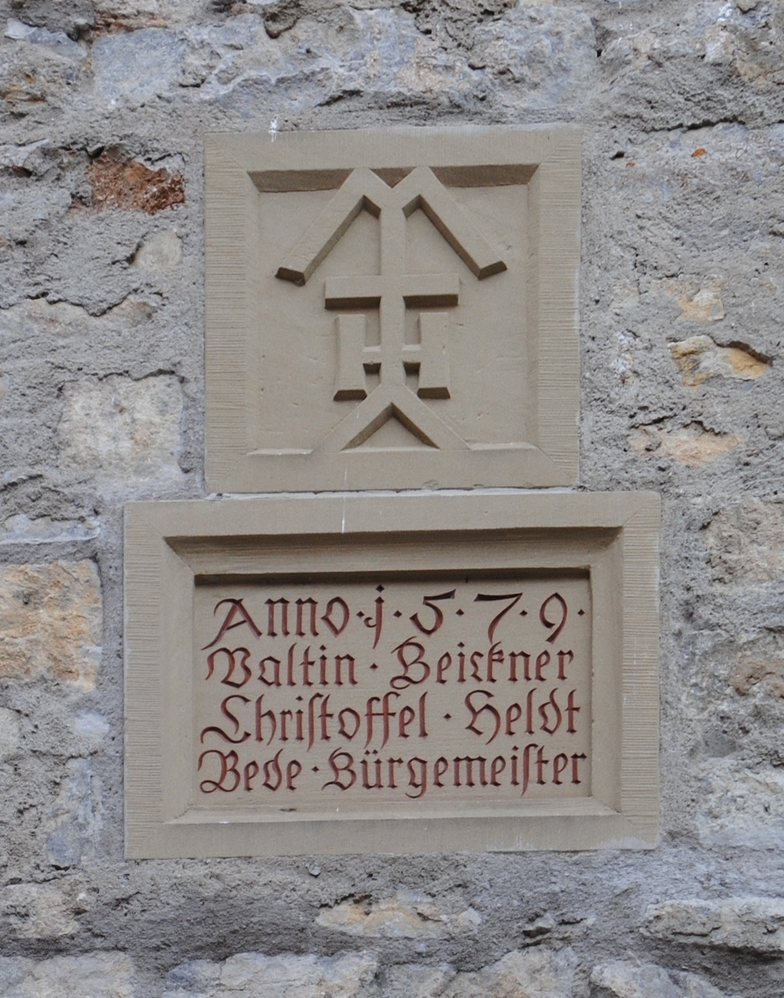 Inschrift, Gaibacher Torturm, Volkach, Anno 1579/ Valtin Beickner/ Christoffel Heldt/ Bede Bürgemeister.